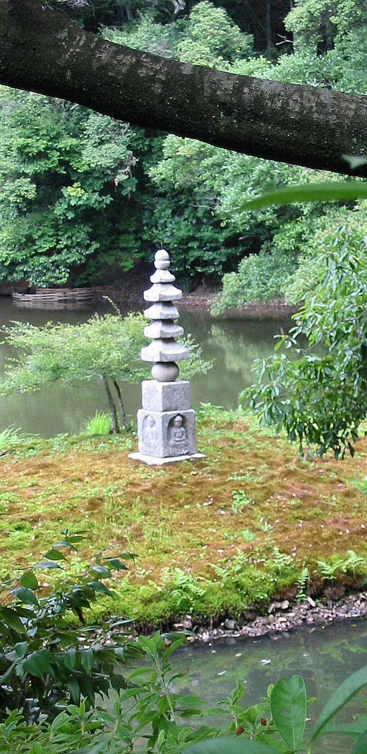 Kinkaku-ji, de kleine pagode genoemd naar de witte slang, eigen foto ter beschikking gesteld onder GFDL licentie